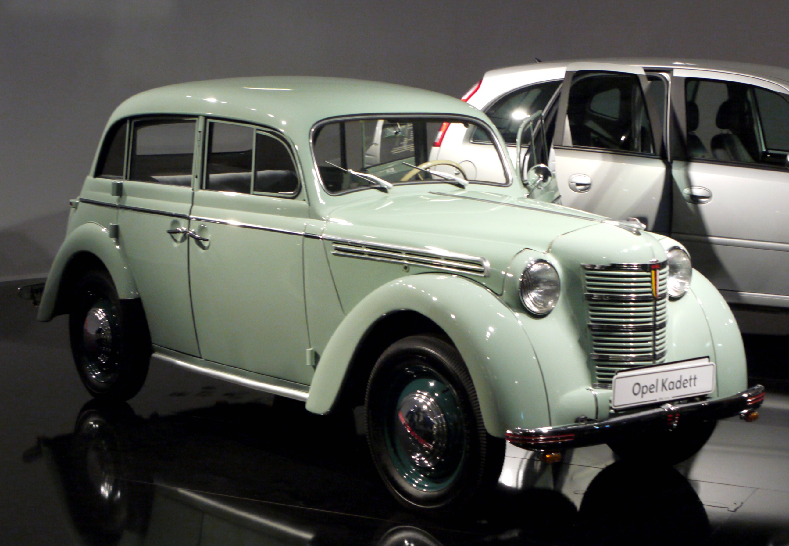 1938 Opel Kadett. Spec.: - 1100 cc - 23 bhp